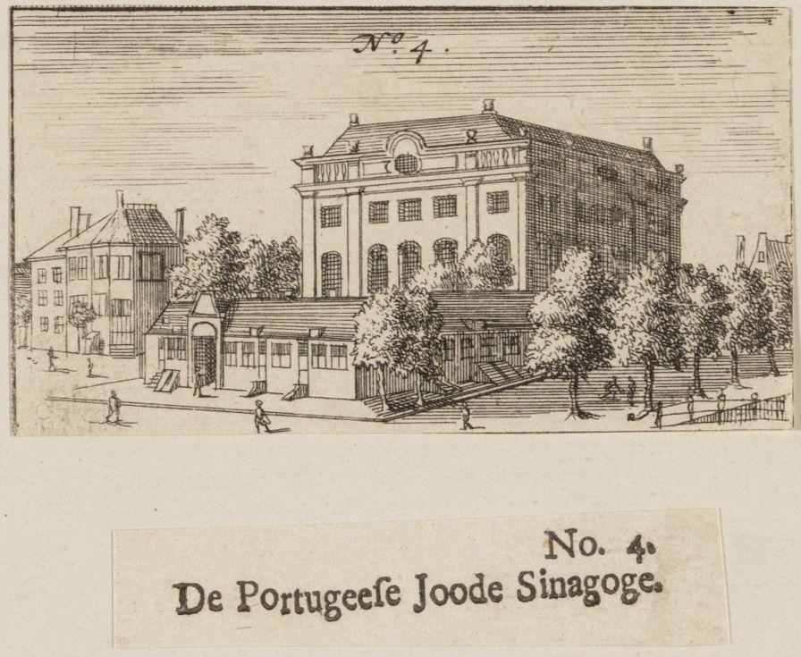 Beschrijving De Portugeese Joode Sinagoge De Portugees-Israëlitisches Synagoge, met links de ingang van de Muiderstraat en huizen aan de Rapenburgerstraat. Etsje uit: 's Waerelds Koopslot Documenttype prent Vervaardiger Verheyden, Jacobus Collectie Collectie Atlas Dreesmann Datering 1723 Geografische naam Mr. Visserplein Inventarissen Afbeeldingsbestand 010094005219